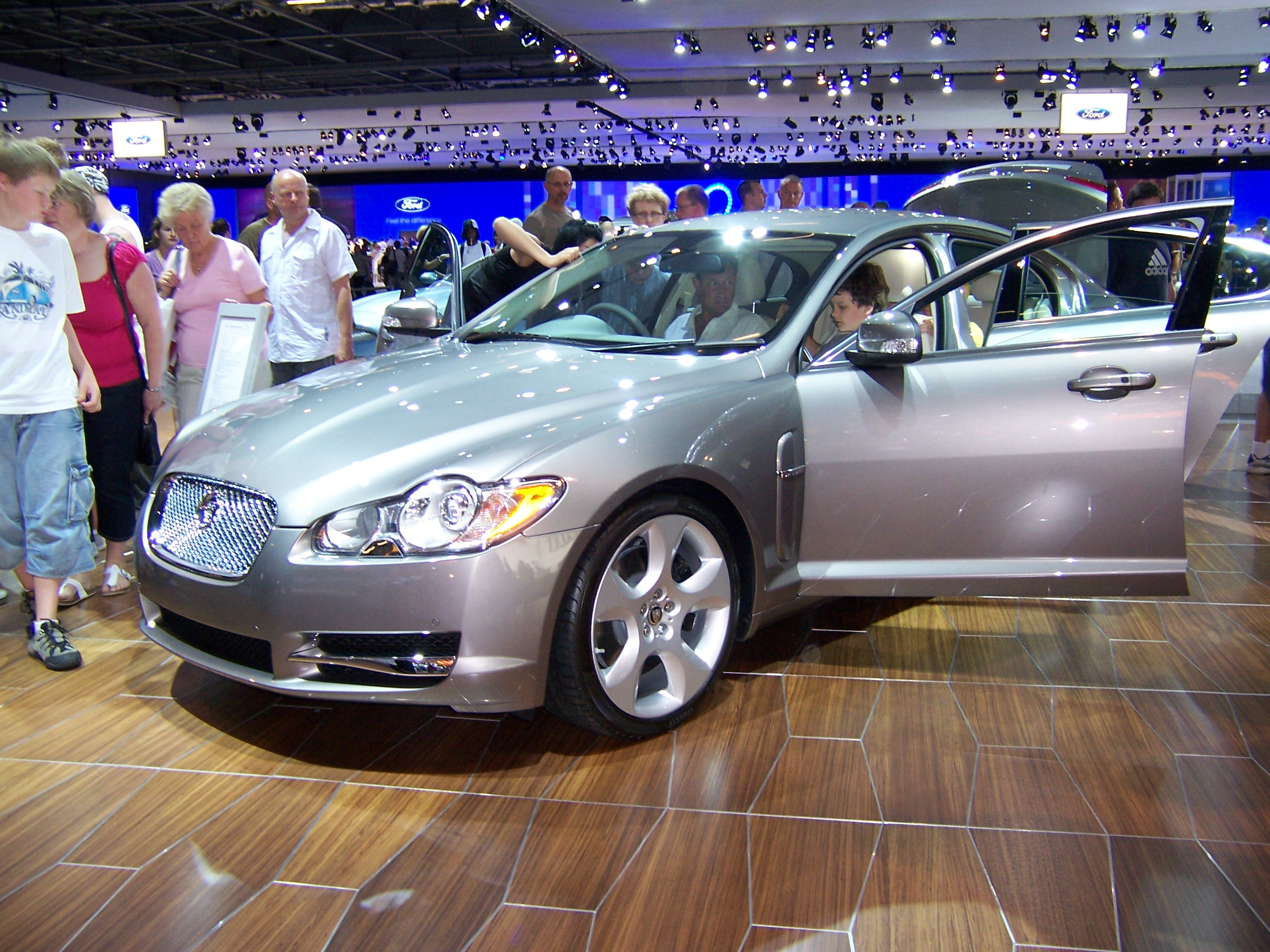 Jaguar XF